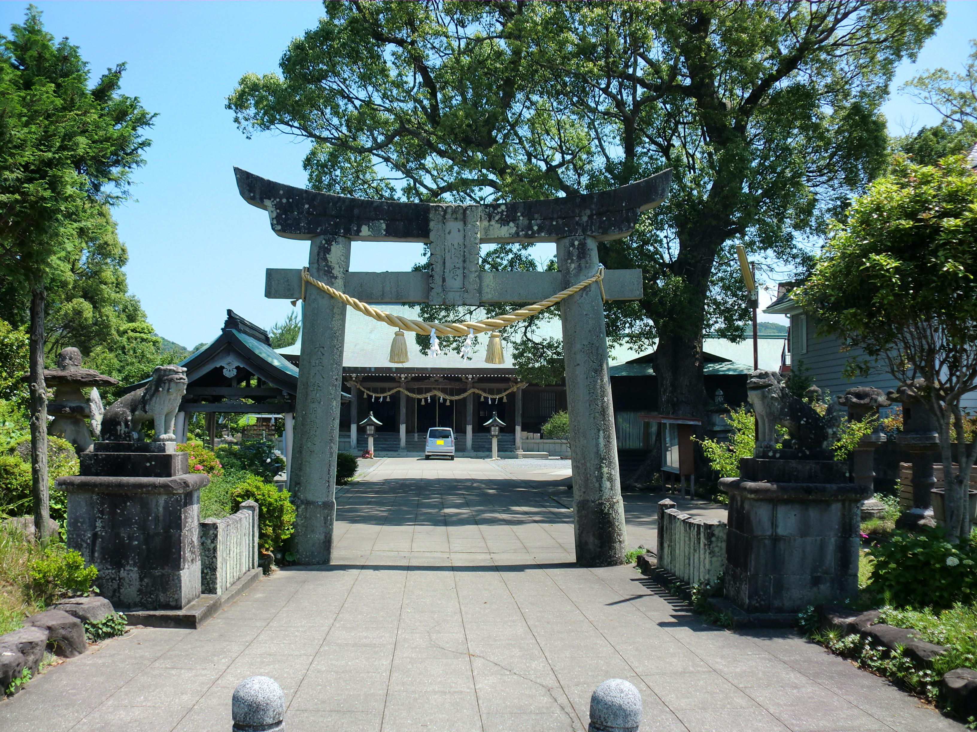 熊本県水俣市にある水俣八幡宮（みなまたはちまんぐう）